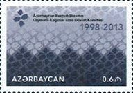 Azərbaycan Respublikasının Qiymətli Kağızlar üzrə Dövlət Komitəsi - 15 il.